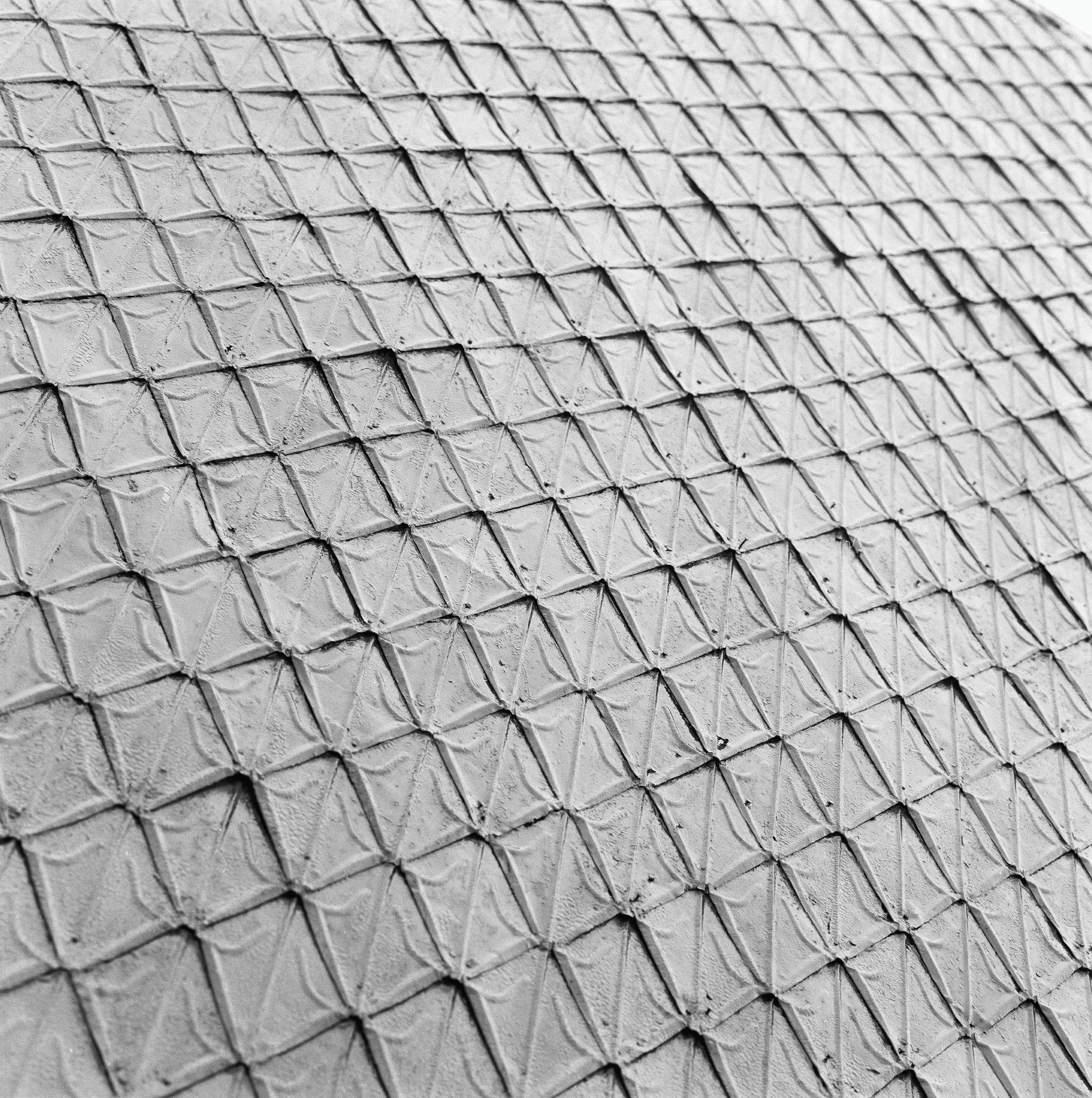 Nederlands Hervormde Kerk: Exterieur ZINKEN LEIEN OP KERKDAK